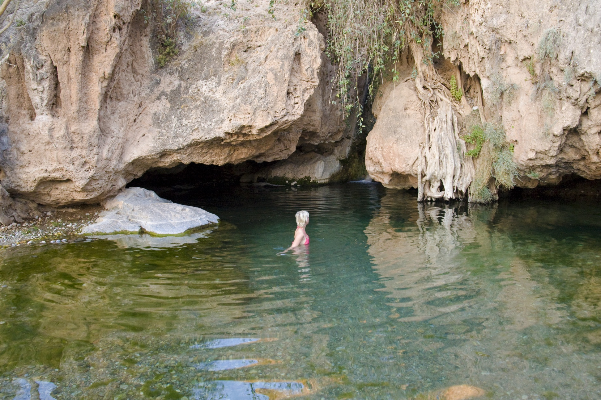 Ongongo/Warmquelle, Kunene Region, Namibia